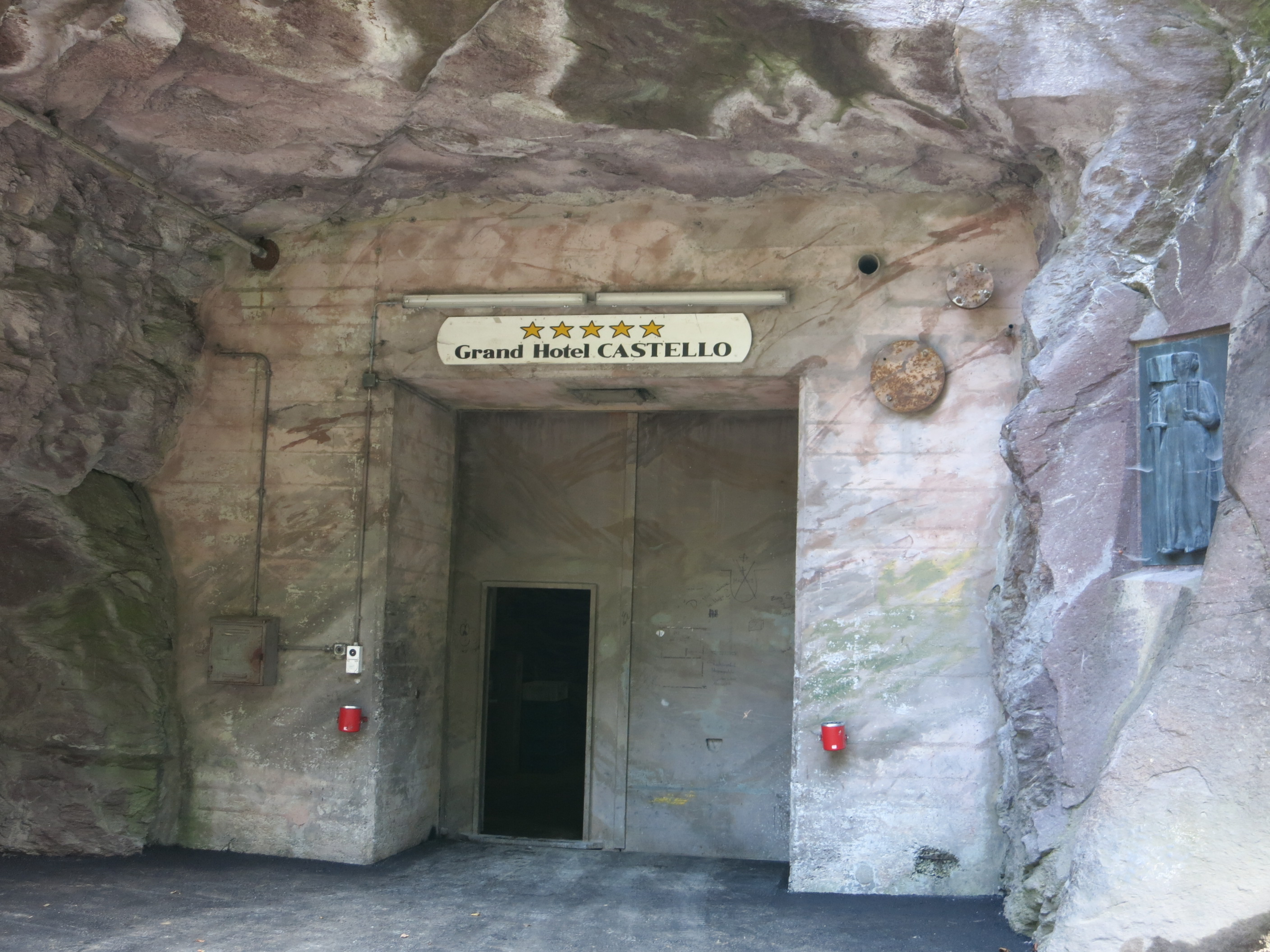 Geoweg Mels SG, Schweiz